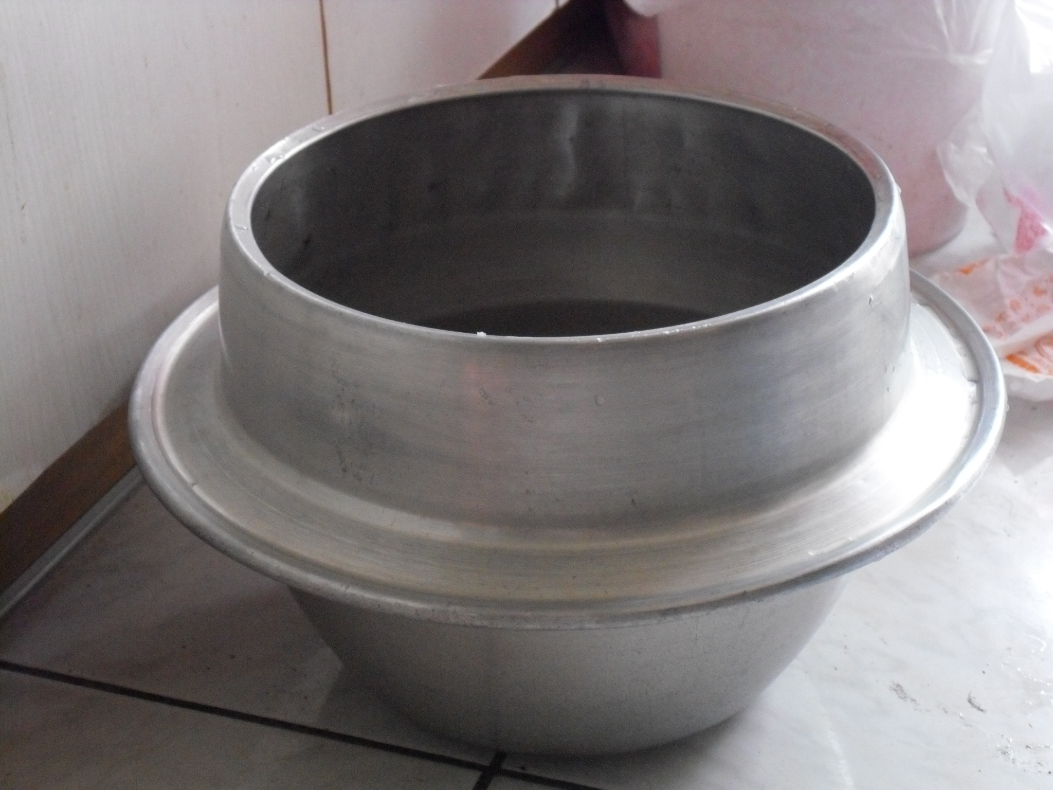 Bân-lâm-gú: 生鍋，無大鼎就用這煠粽，佇臺灣臺中潭子翕的。